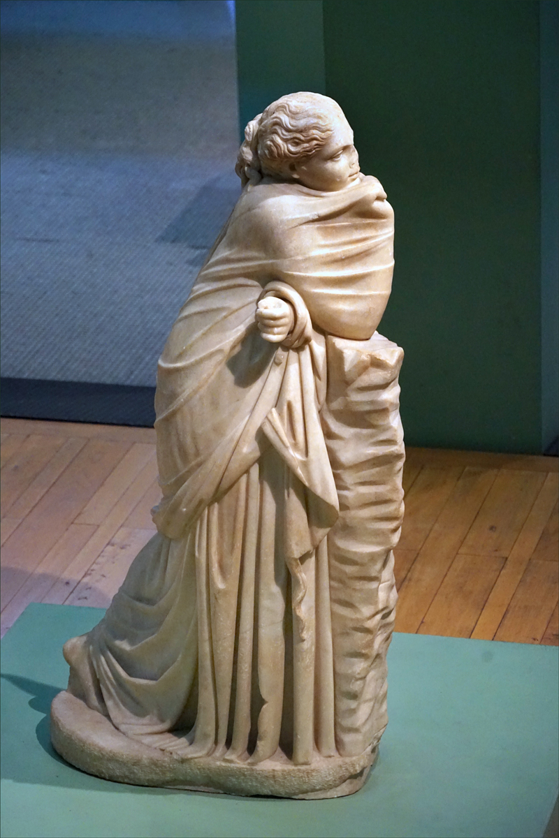 Statue d'une Muse (Polymnie ?) Marbre (Parian marble) Il s'agit d'une copie romaine d'une statue créée par Philiskos de Rhodes au 2ème siècle et transportée à Rome. Elle a été découverte via Terni La statue montre une jeune femme perdue dans ses pensées et appuyée sur un rocher. L'identification à Polymnie, la muse de la rhétorique n'est pas certaine. C'est un des chefs-d'oeuvre du musée. Le centre d'exposition des musées du Capitole dans l'ancienne centrale thermoélectrique Giovanni Montemartini à Rome est un exemple étonnant d'un site industriel transformé en musée. Il a ouvert en 1997 avec l'installation de centaines de sculptures antiques. Cette centrale électrique, mise en fonctionnement au début des années 1900, a été la première à Rome. Site de la Centrale Montemartini (Rome)